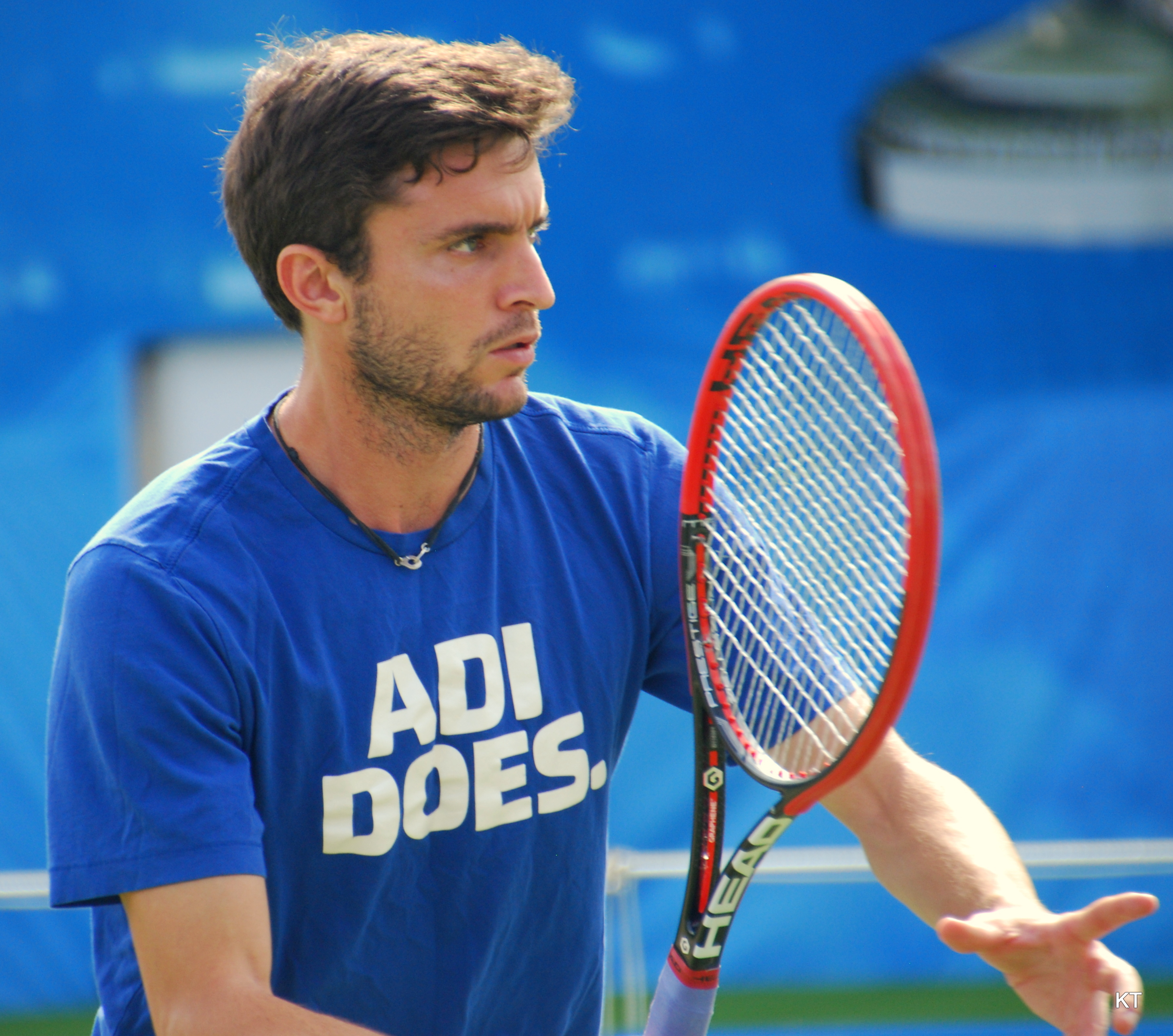 Gilles Simon